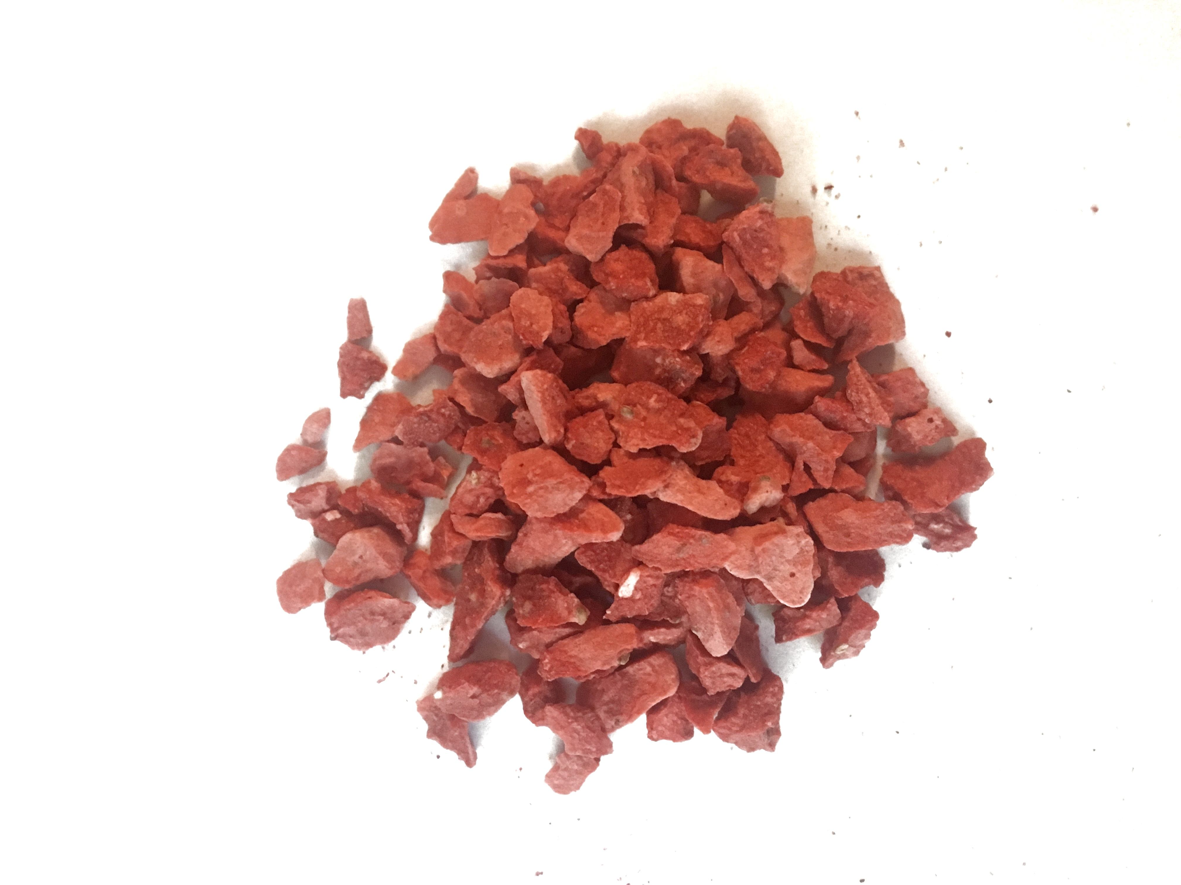 Džiovintų šaltyje braškių granulės